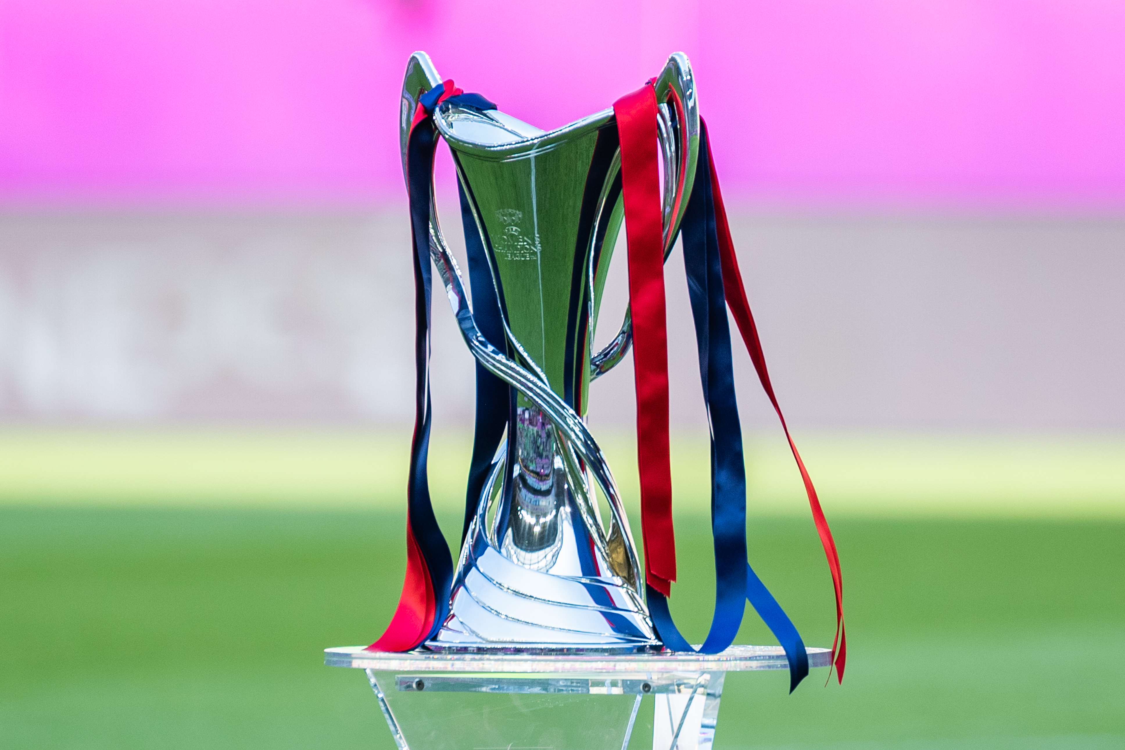 Fußball, Frauen, UEFA Women's Champions League, Olympique Lyonnais - FC Barcelona; der UWCL-Pokal; Symbolbild